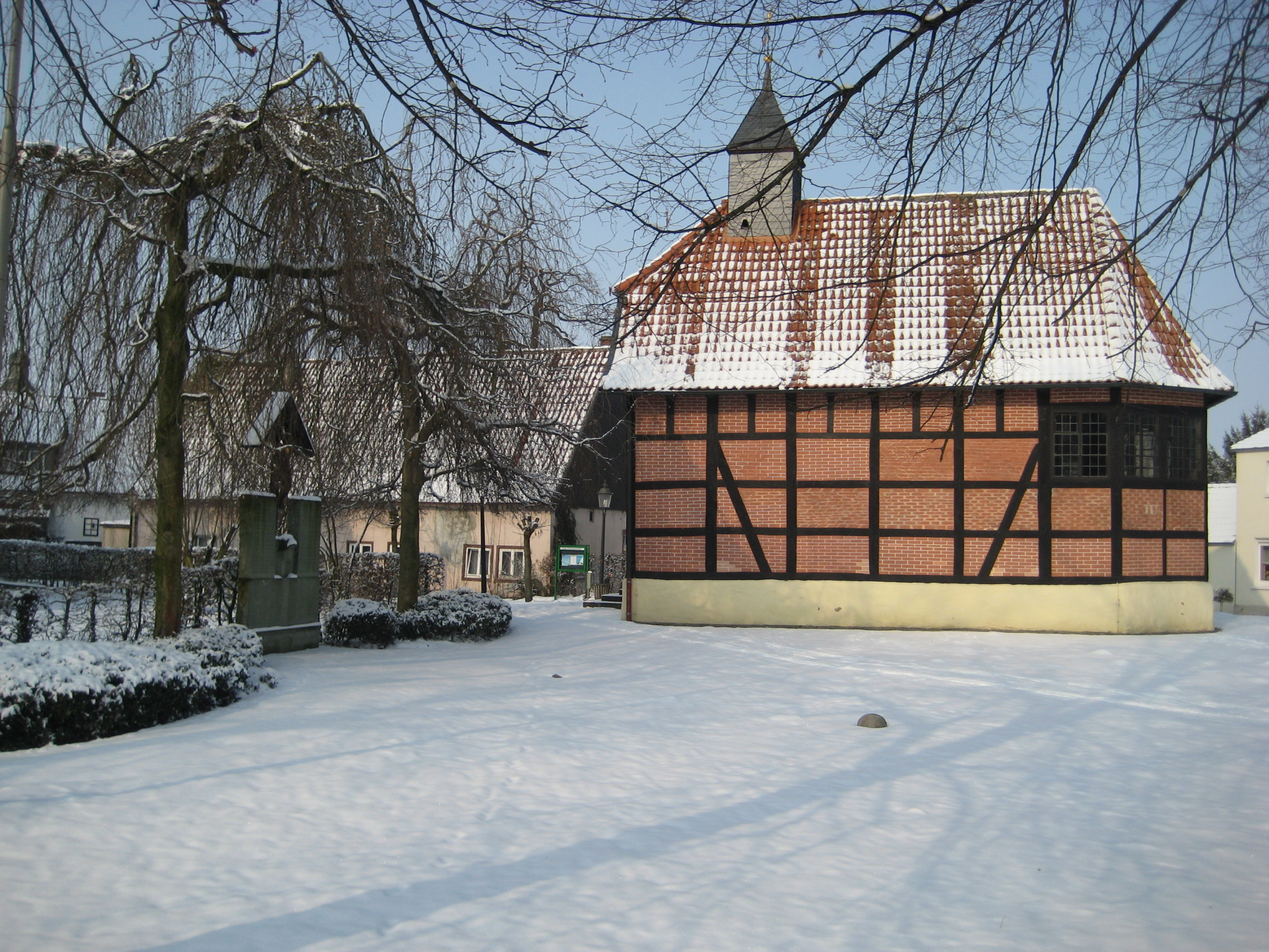 Deitsch: Die ehemalige Schlosskapelle des Wasserschlosses Overhagen im Winter (heutige im Eigentum der Evangelischen Kirchengemeinde); Schlossgraben, 59556 Lippstadt-Overhagen. This is a photograph of an architectural monument.